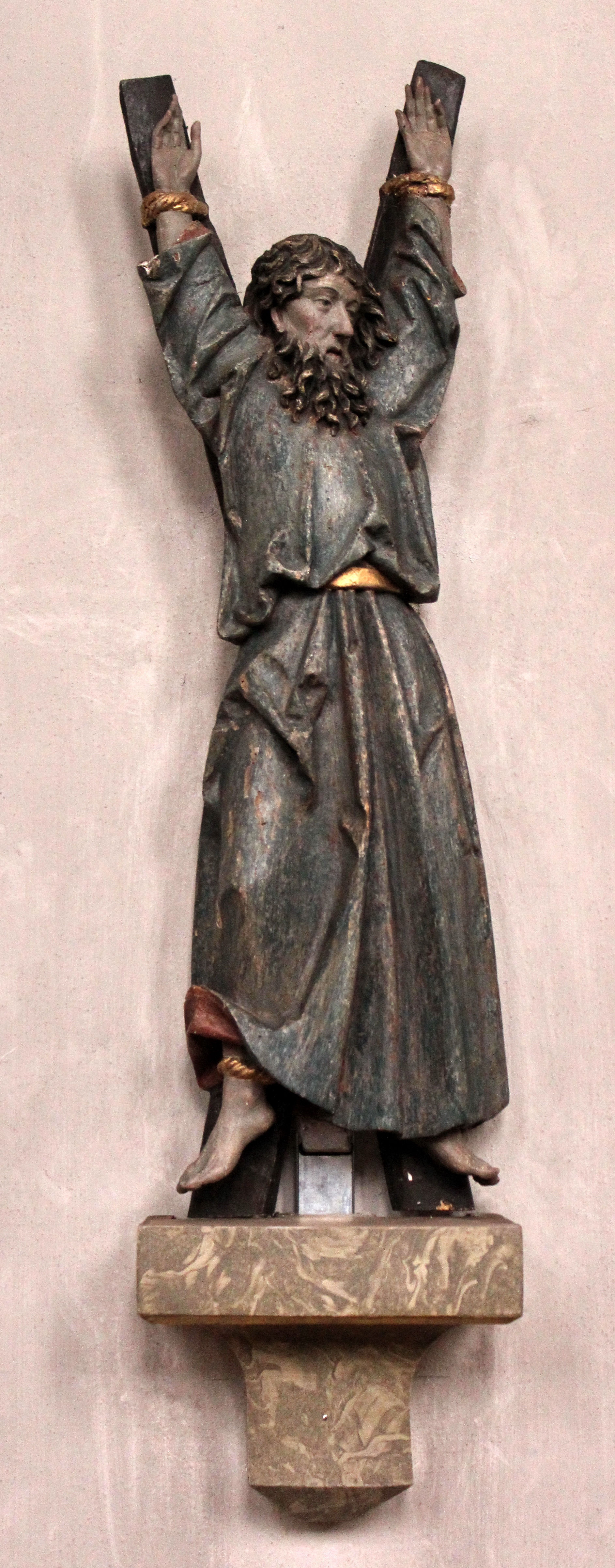 Figur des Hl. Apostel Andreas an der nördlichen Langhauswand der St. Nikolauskirche in Veringenstadt. Die 60 cm hohe Figur ist aus Lindenholz, auf der Rückseite glatt, alte Fassung wurde freigelegt und ergänzt. Bildhauer der Familie Strüb, Veringenstadt um 1510 (evtl. Jakob Strüb d. J.).